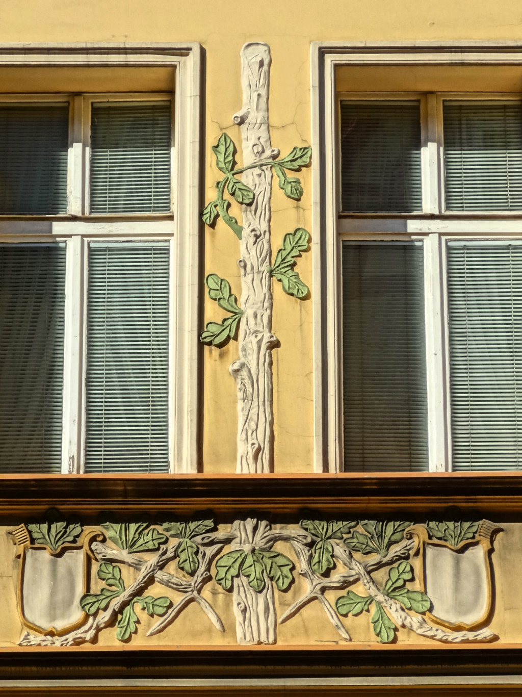 Kamienica przy ul. Cieszkowskiego 22 w Bydgoszczy (1898-1899, Fritz Weidner)